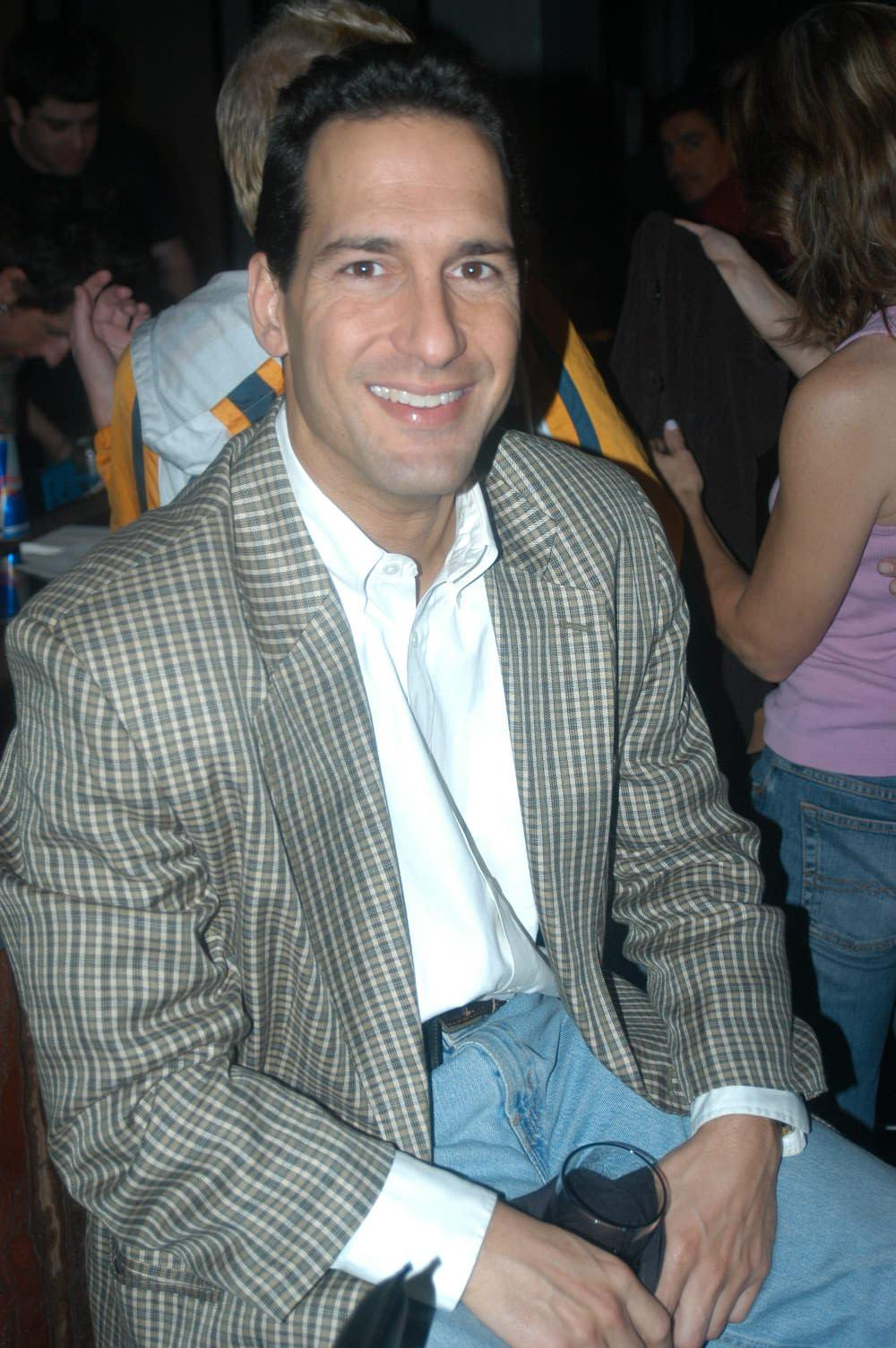 Dino Bravo at Deep Throat Hi-Def Premiere.